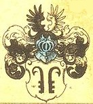 Wappen des Thüringer Adelsgeschlechtes Hagen, Siebmachers Wappembuch, Blatt 149 (1605)